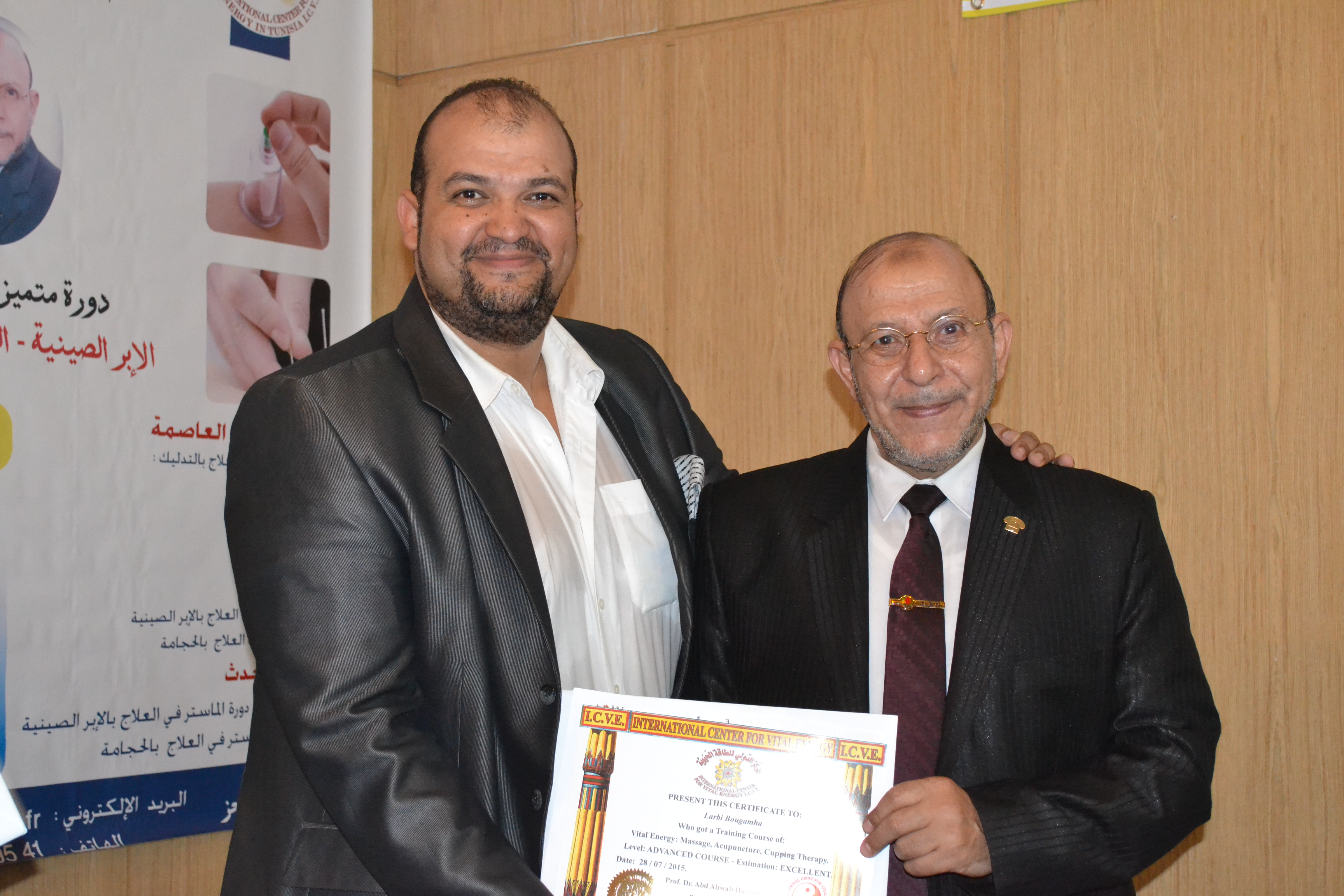 شهادة ماستر علاج بالابر الصينية ومستوى متقدم في التدليك وماستر في العلاج بالحجامة الاسلامية سلّمت من قبل الدكتور عبد التواب حسين رئيس الجامعة الدولية للطاقة الحوية بالقاهرة